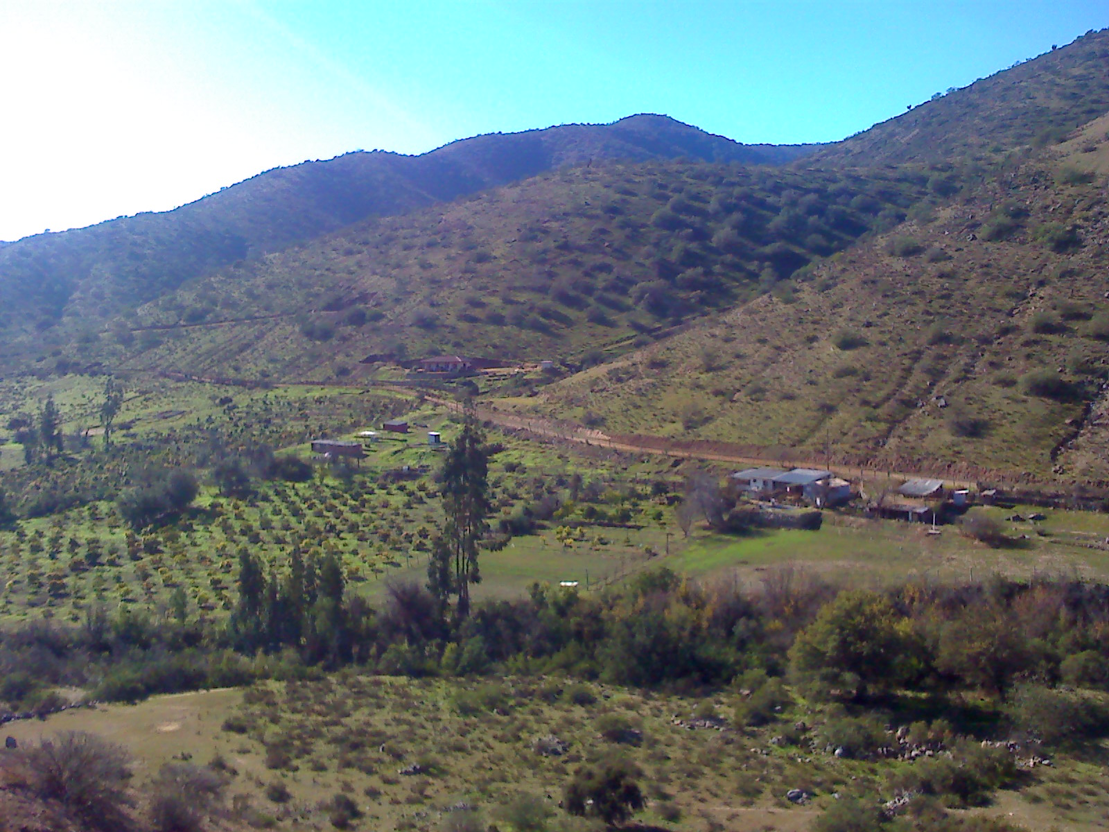 Paisaje de Viña vieja